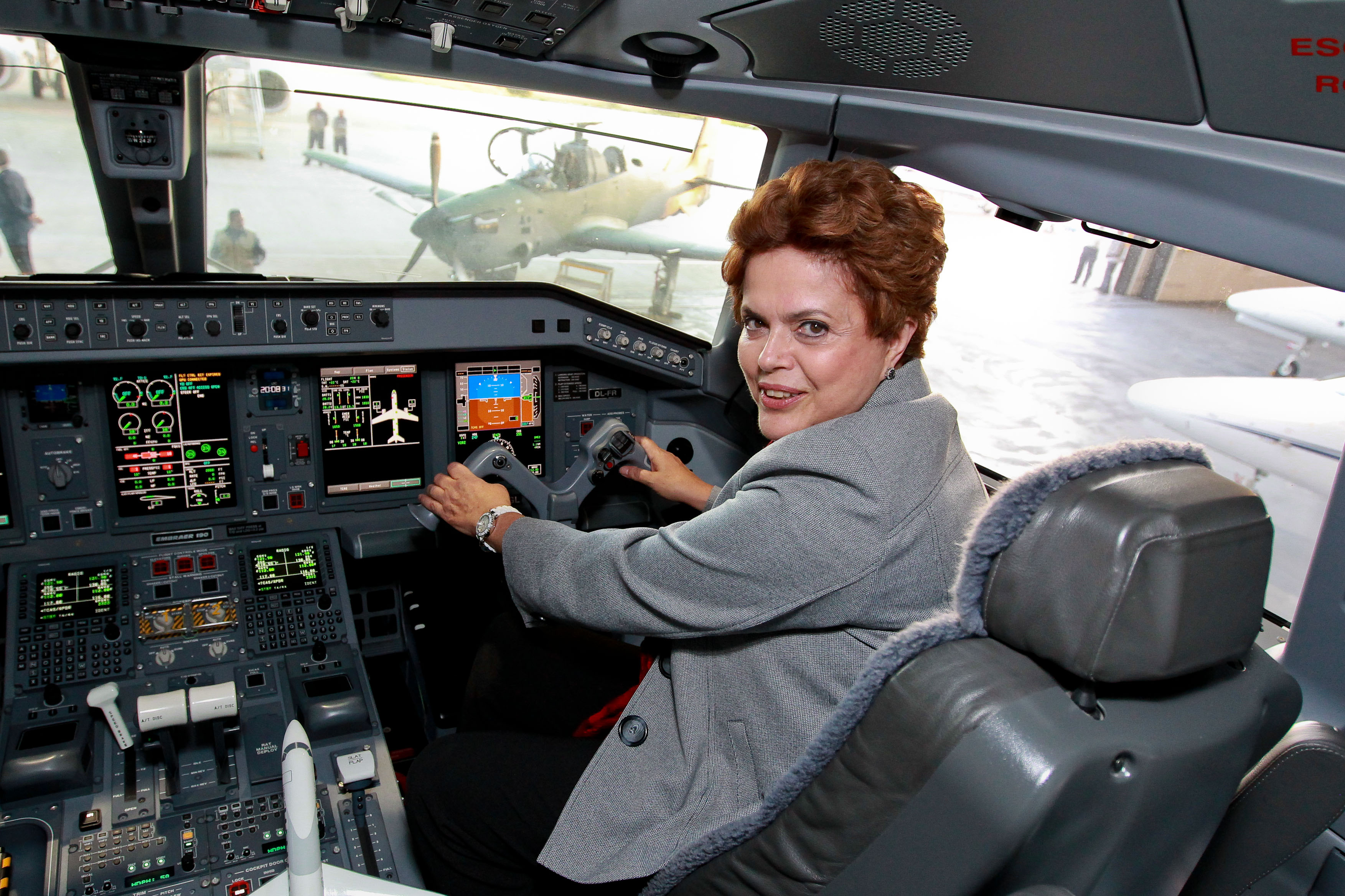 Dilma Rousseff em visita à Empresa Brasileira de Aeronáutica S.A (Embraer) em São José dos Campos, São Paulo, Brasil.